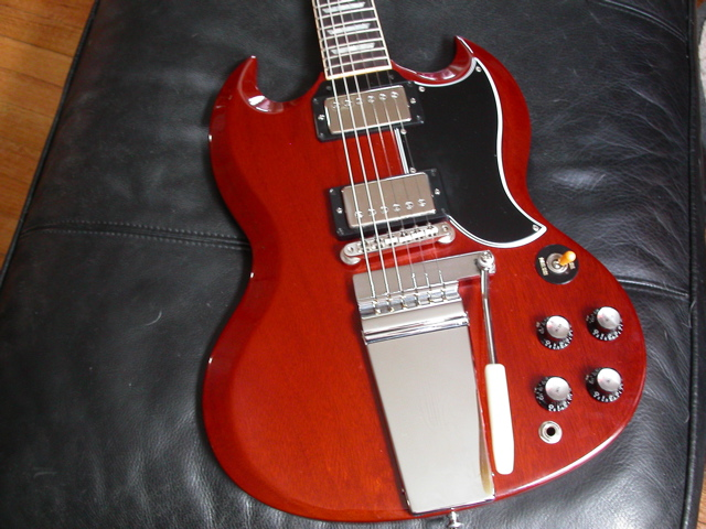 Gibson SG/LP